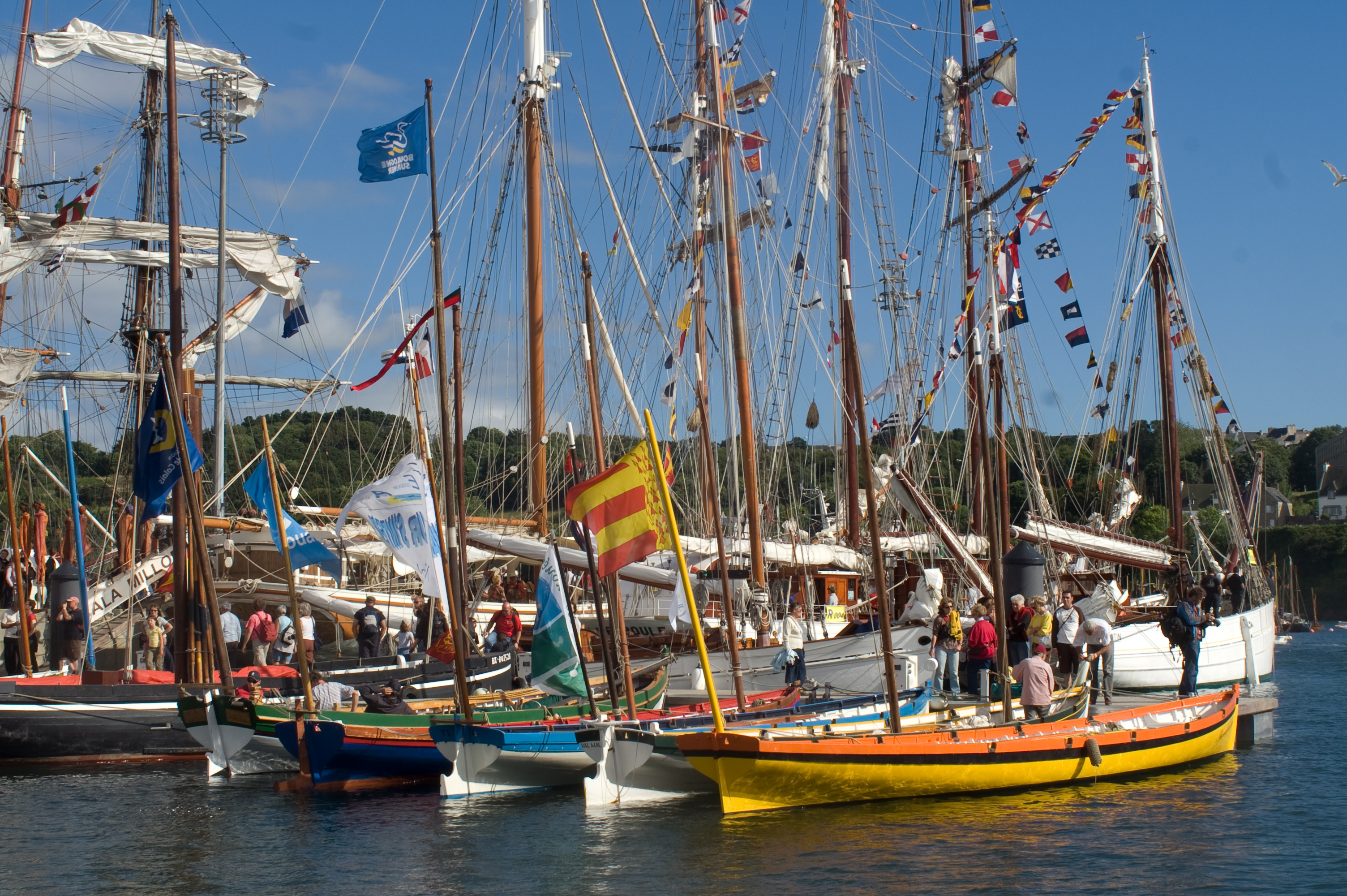 Des yoles de Bantry lors des Fêtes Maritimes de Douarnenez (Finistère, France) en juillet 2008. De droite à gauche : Spered ar Mor (Le Guilvinec), Val Maubuée (Marne-la-Vallée), Ma'yole (Toulon), Amitié (Douarnenez) et Profils pour l'avenir (Dunkerque).